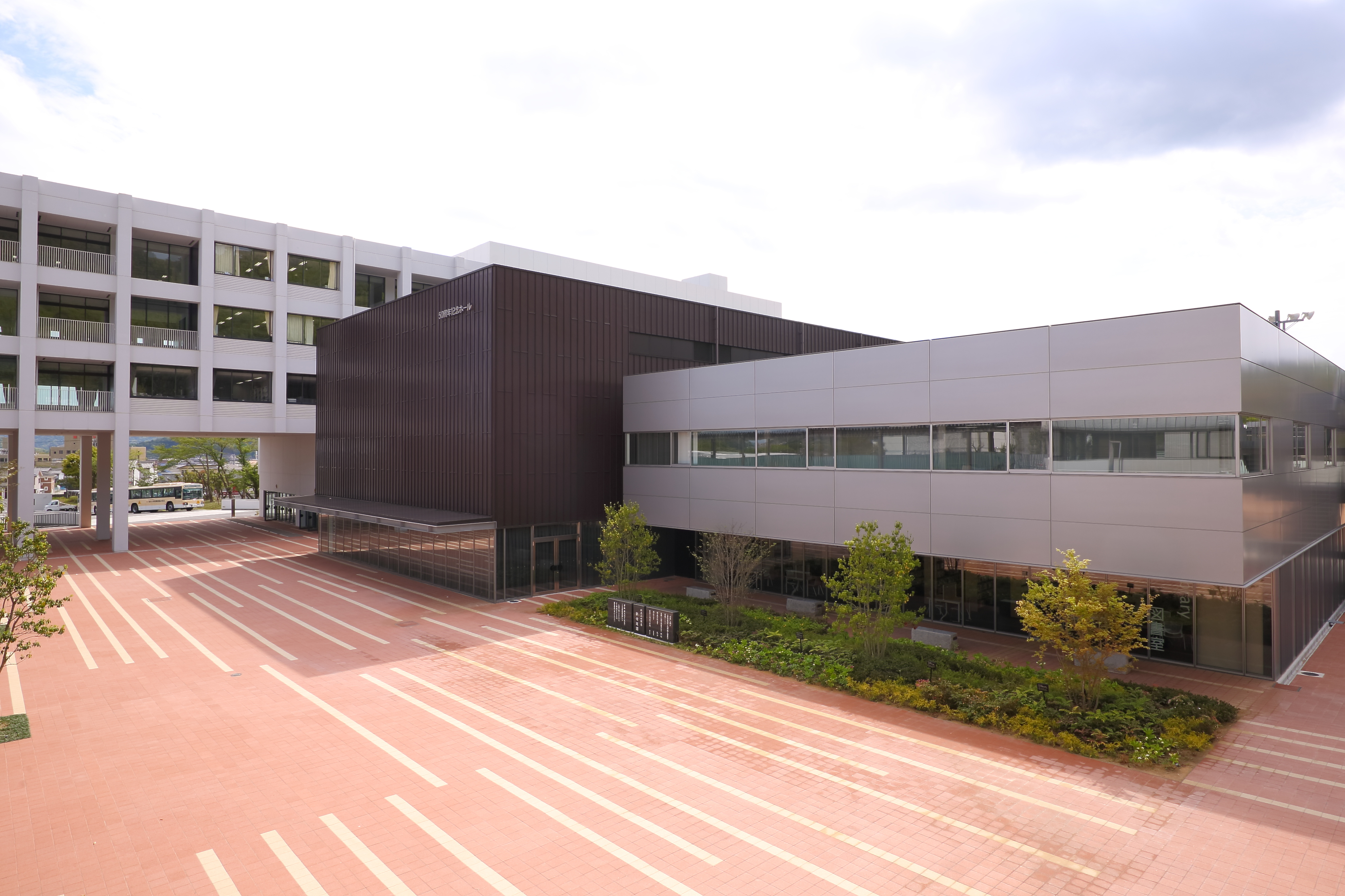 50周年記念ホール